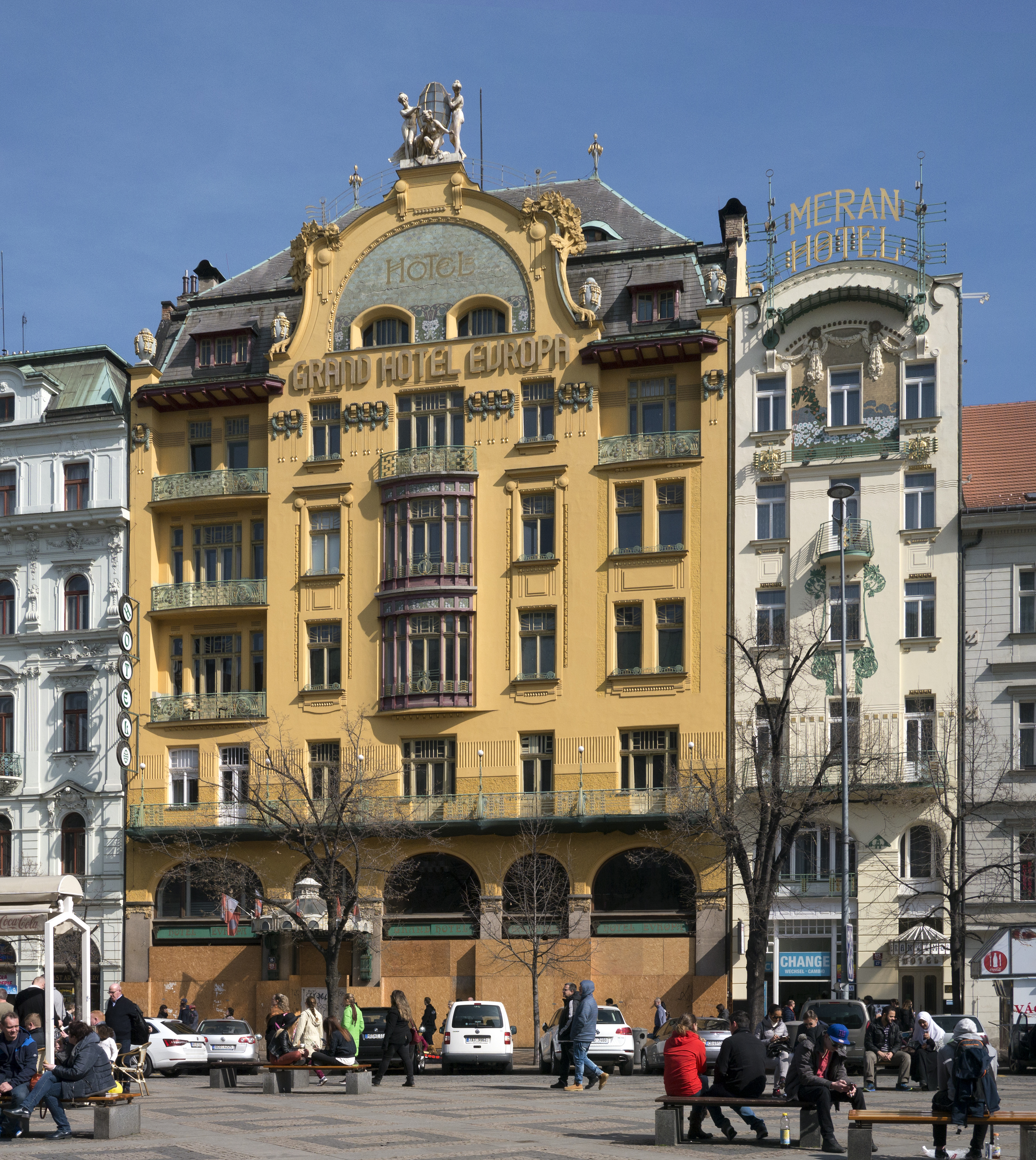 Prag Grand Hotel Evropa